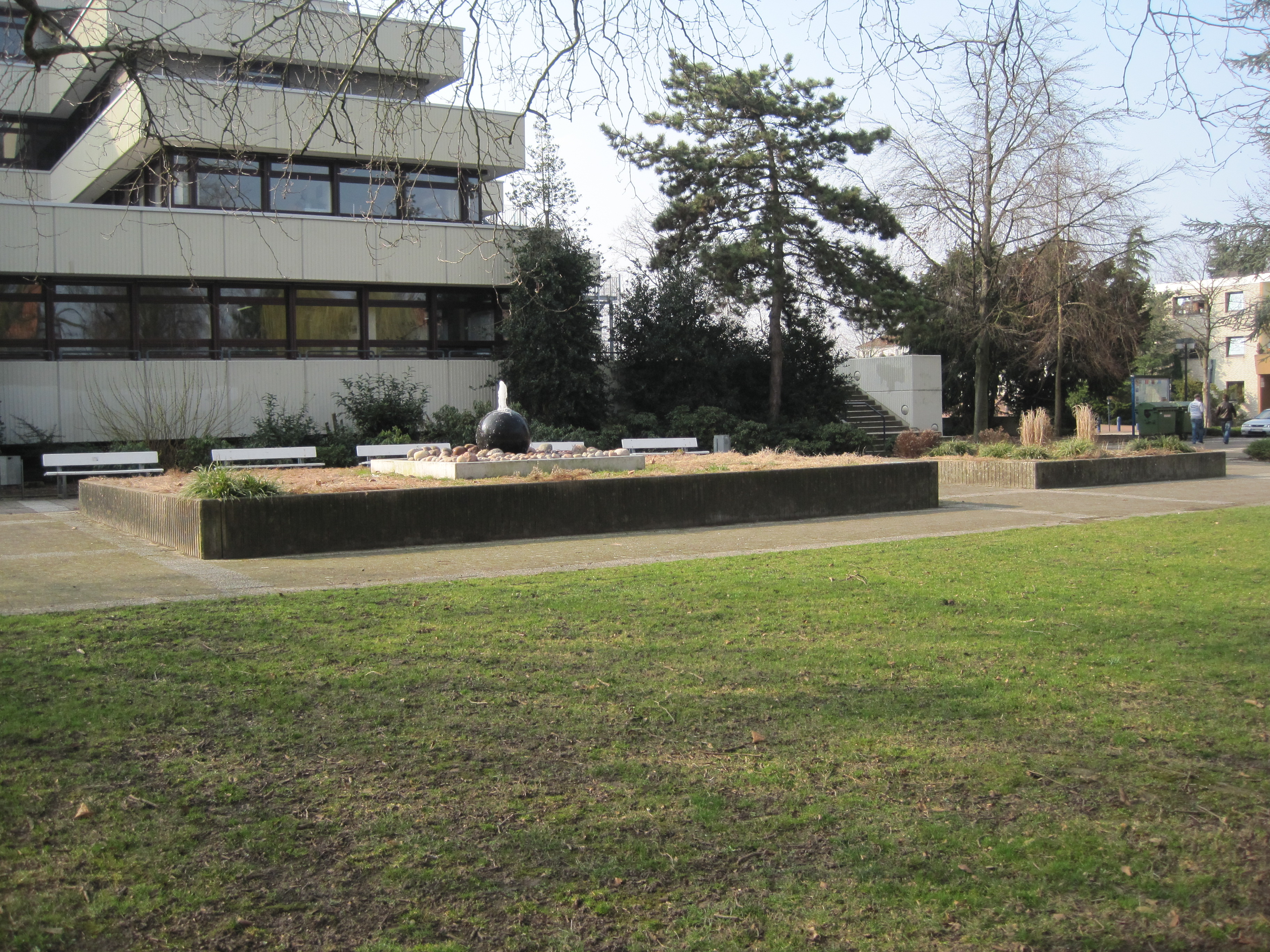 Das Foto zeigt den Brunnen vor dem Rathaus Bockum-Hövel.